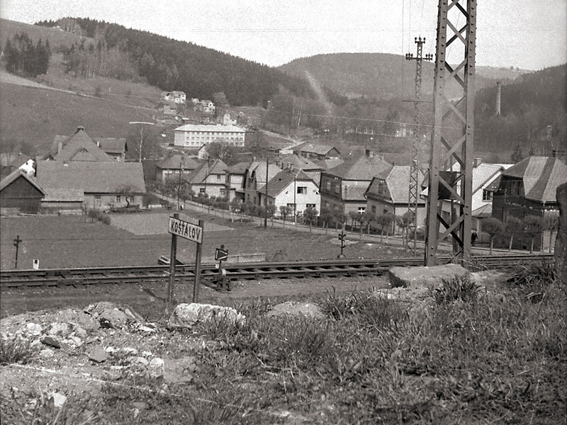 Obec Košťálov (okr. Semily) asi na počátku 50. let 20. století